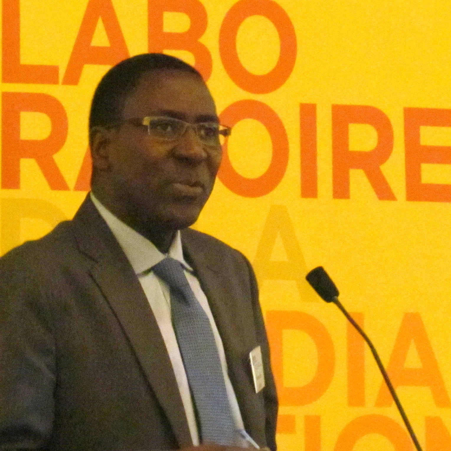 Le professeur Mamoudou Gazibo en mai 2016